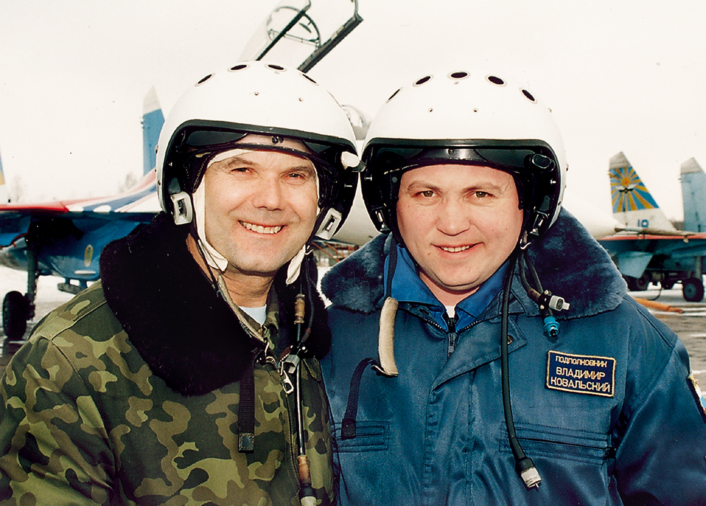 1999 г. Подмосковный аэродром Кубинка. На снимке: Генерал авиации Павел Кузнецов и подполковник Владимир Ковальский после тренировочного полёта